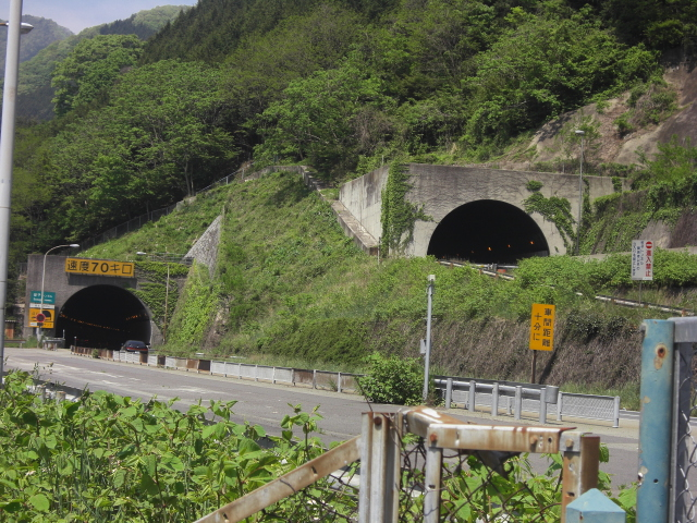 中央自動車道・笹子トンネル入口